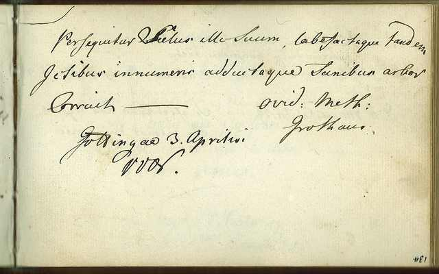 Stammbuch des Johan David af Sandeberg. Eintrag des Oberstleutnant Karl von Grothaus.